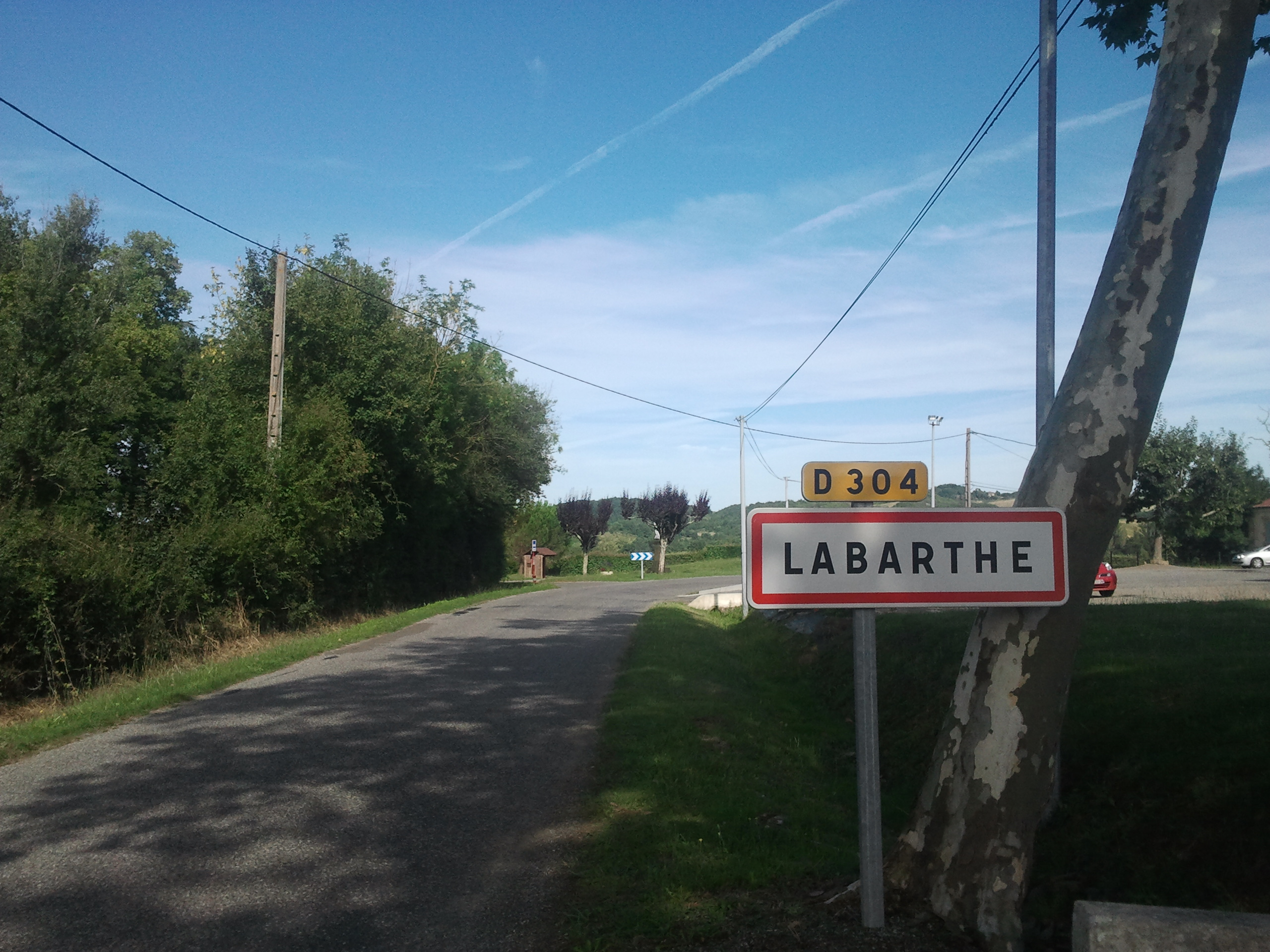 Entrée de Labarthe sur la D304